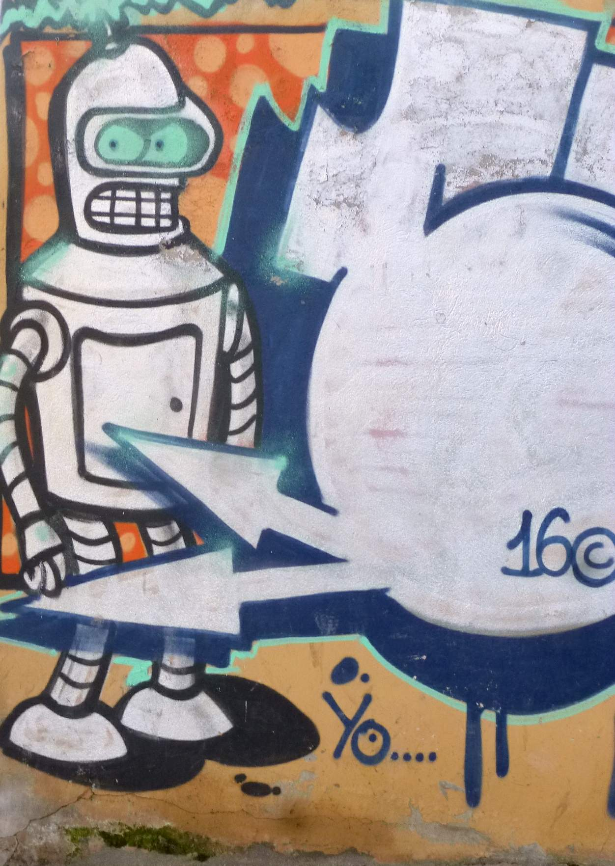 Graffiti en Zamora